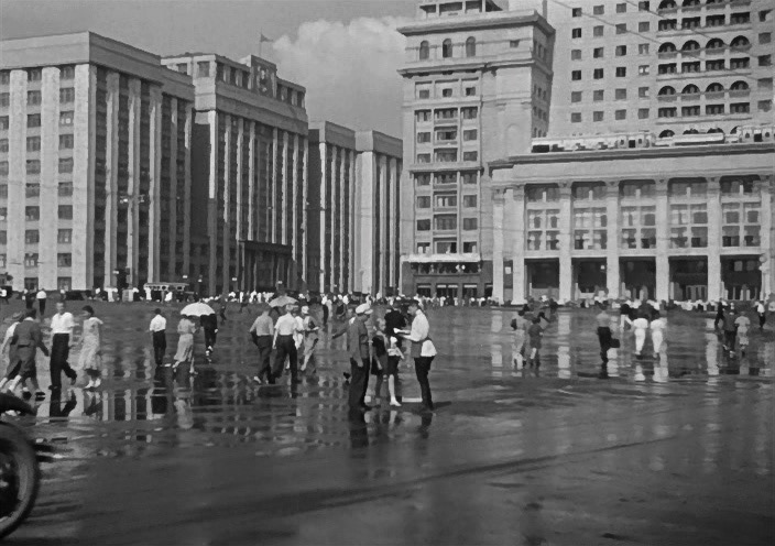 «Подкидыш» — художественный фильм производства киностудии «Мосфильм» 1939 года. Один из самых первых семейных фильмов в Советском Союзе, сценаристами которого стали актриса Рина Зелёная и писательница Агния Барто. Москва в фильме